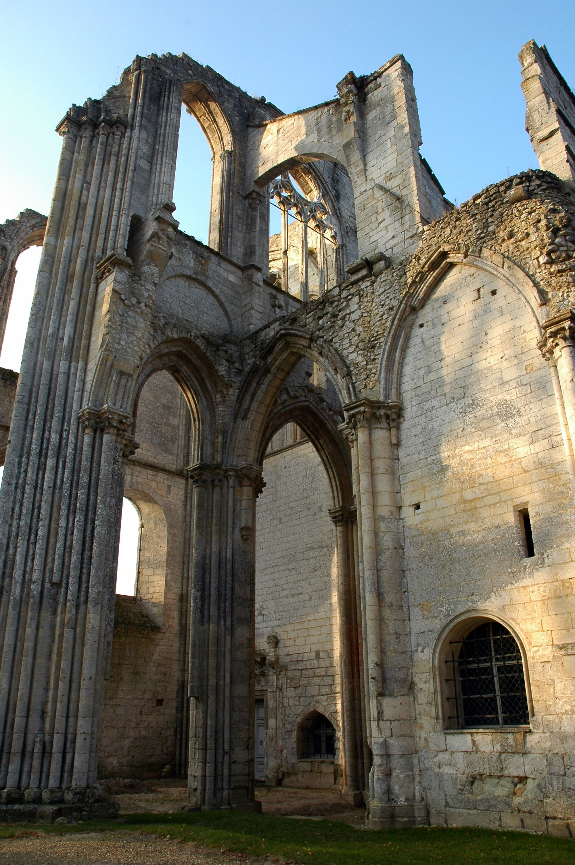 Saint-Wandrille-Rançon (Seine-Maritime, France) Les ruines de l'ancienne abbatiale Saint-Pierre. .